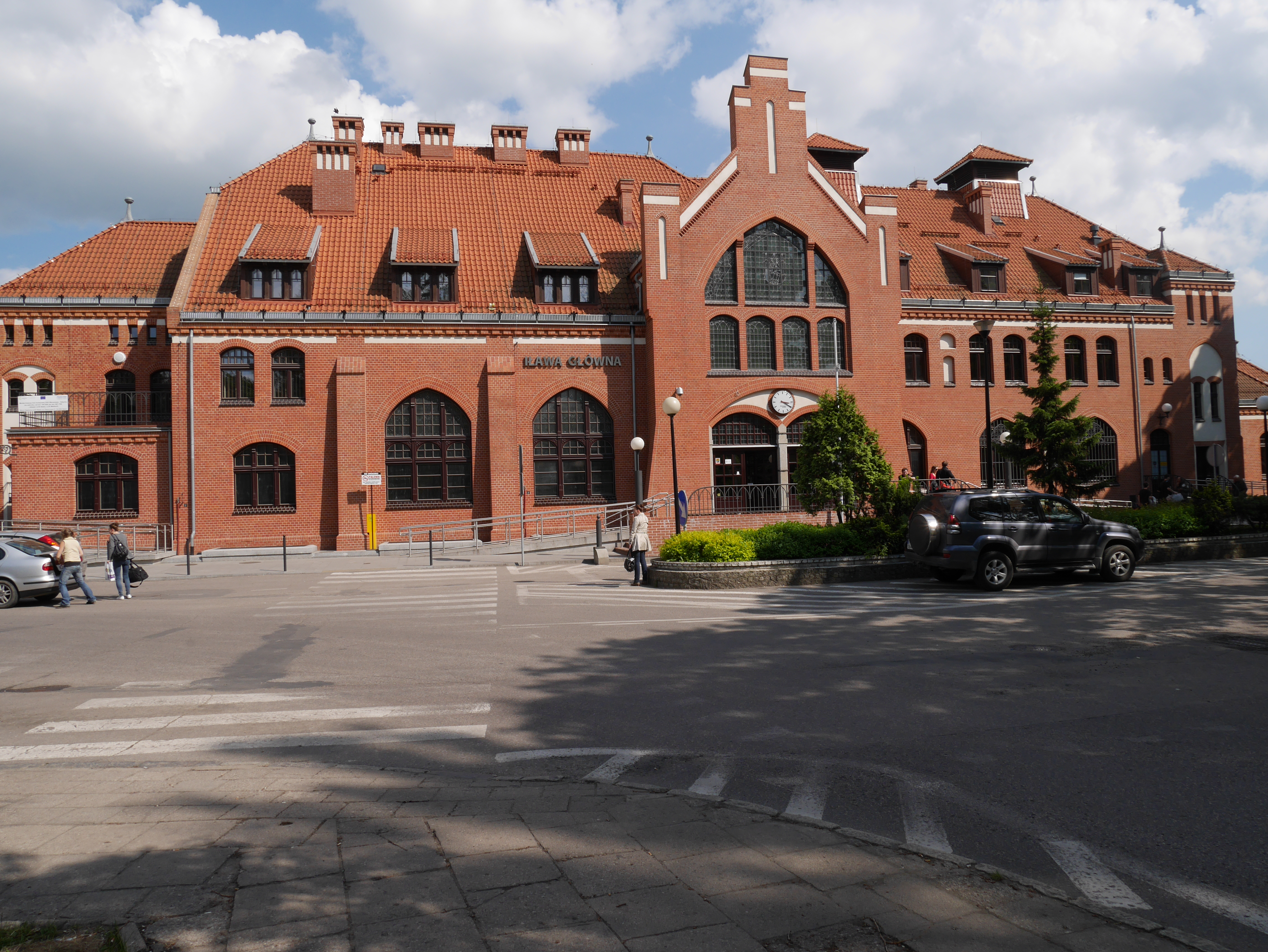 Iława Główna od frontu